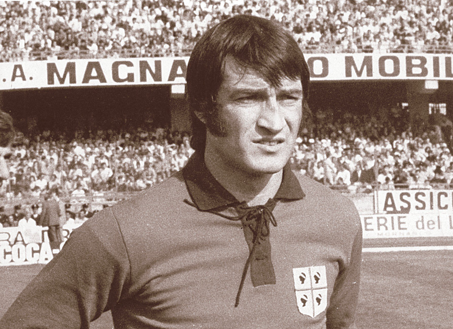 Il portiere di calcio italiano Enrico Albertosi al Cagliari tra gli anni 60 e 70 del XX secolo.